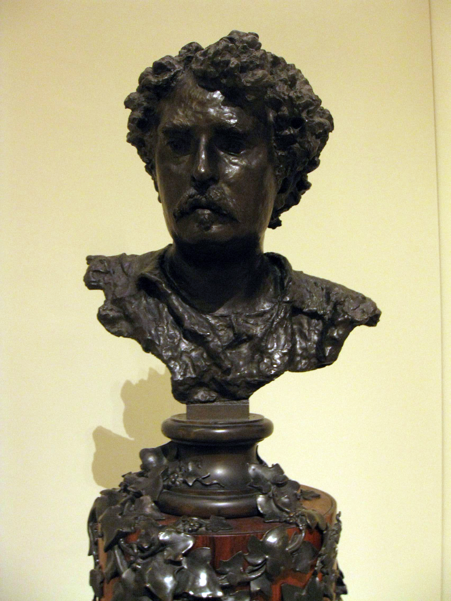 Palau Nacional (Barcelona)